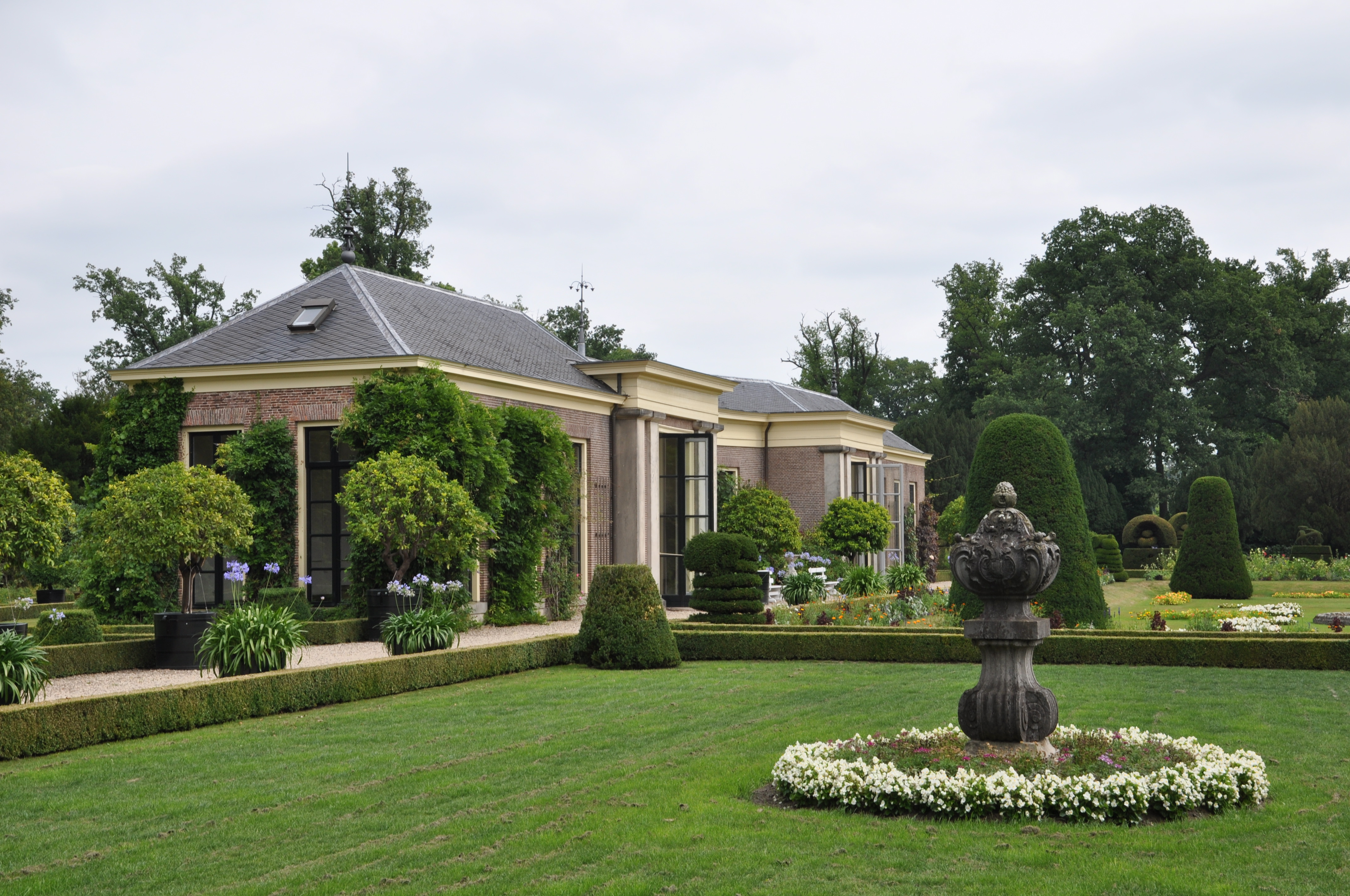 Landgoed Twickel bij Delden.